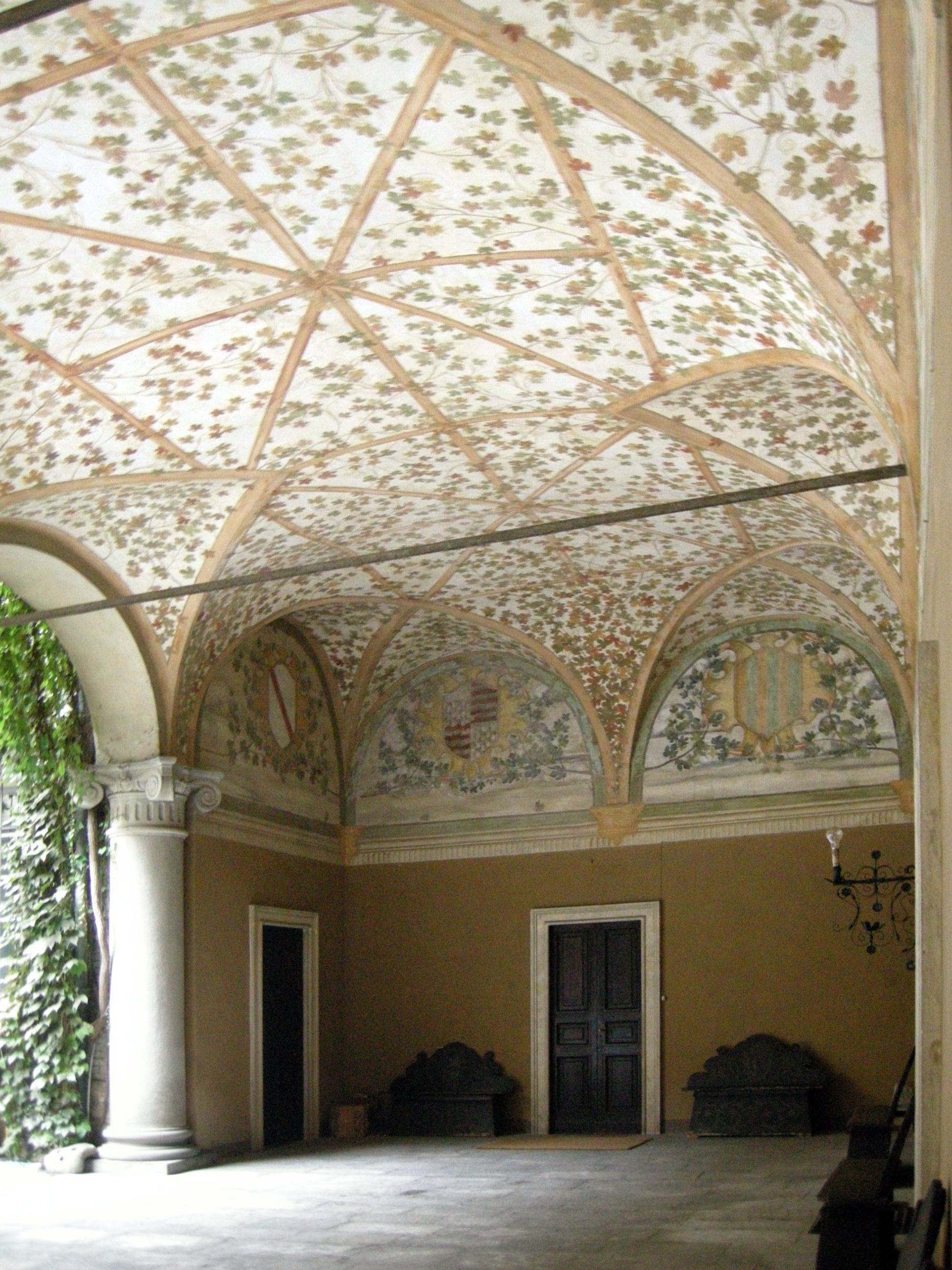 Soragna, rocca